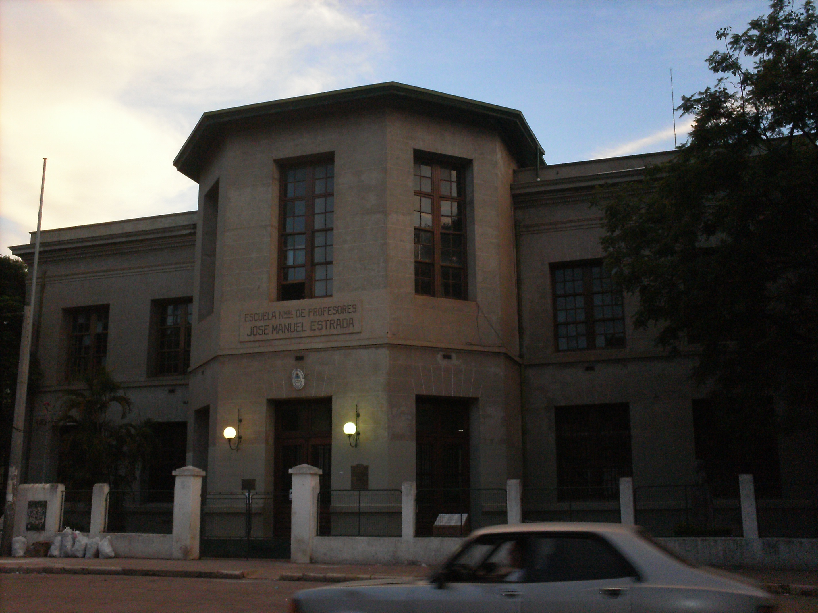 Escuela Normal “José Manuel Estrada”, declarada "Monumento Histórico Nacional", por Decreto 230/2014 del Poder Ejecutivo Nacional, publicado el 07/03/2014, en página 5 del Boletín Oficial de la República Argentina.